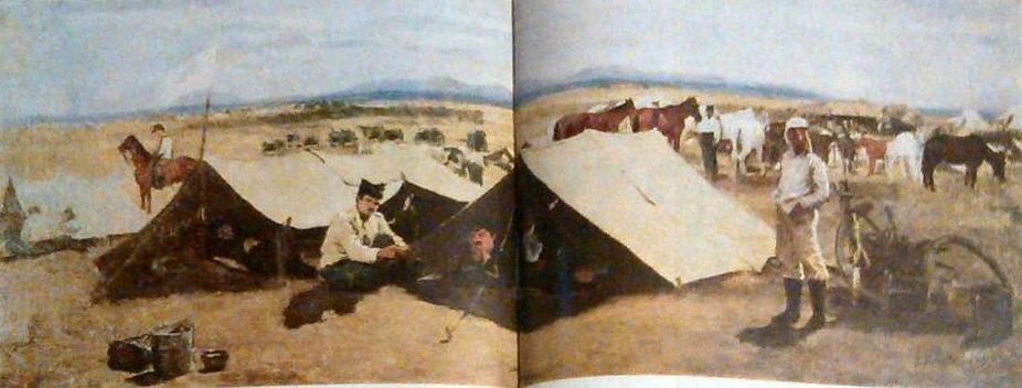 Bivuac (versiune) - Muzeul Municipiului Bucureşti